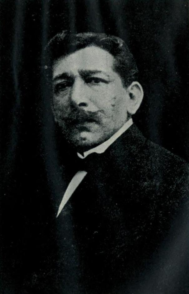 Guillermo Córdova (Chañarcillo, 1869 - Santiago, 15 de enero de 1936) fue un escultor e ilustrador chileno, discípulo de Nicanor Plaza.1​